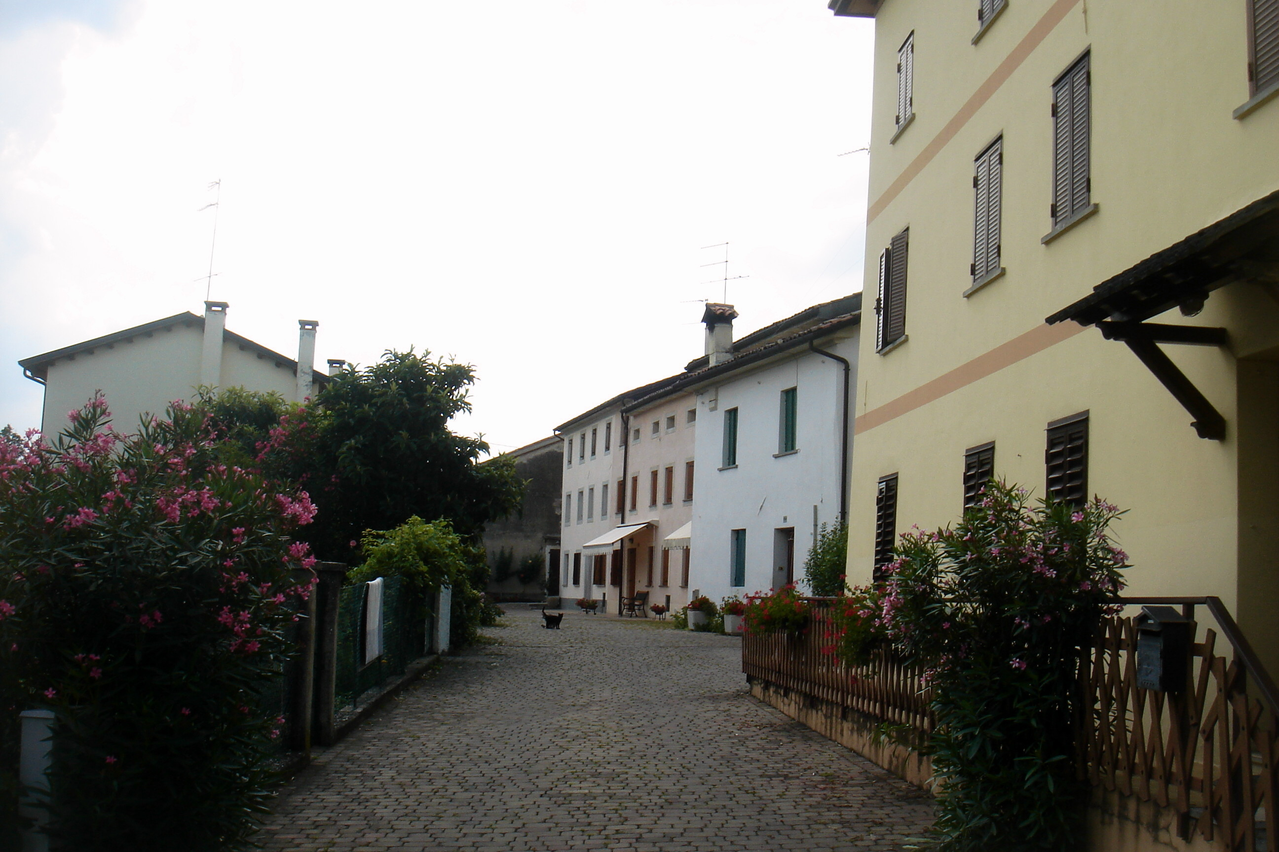 Castello Roganzuolo, borgo Gardin, sguardo complessivo